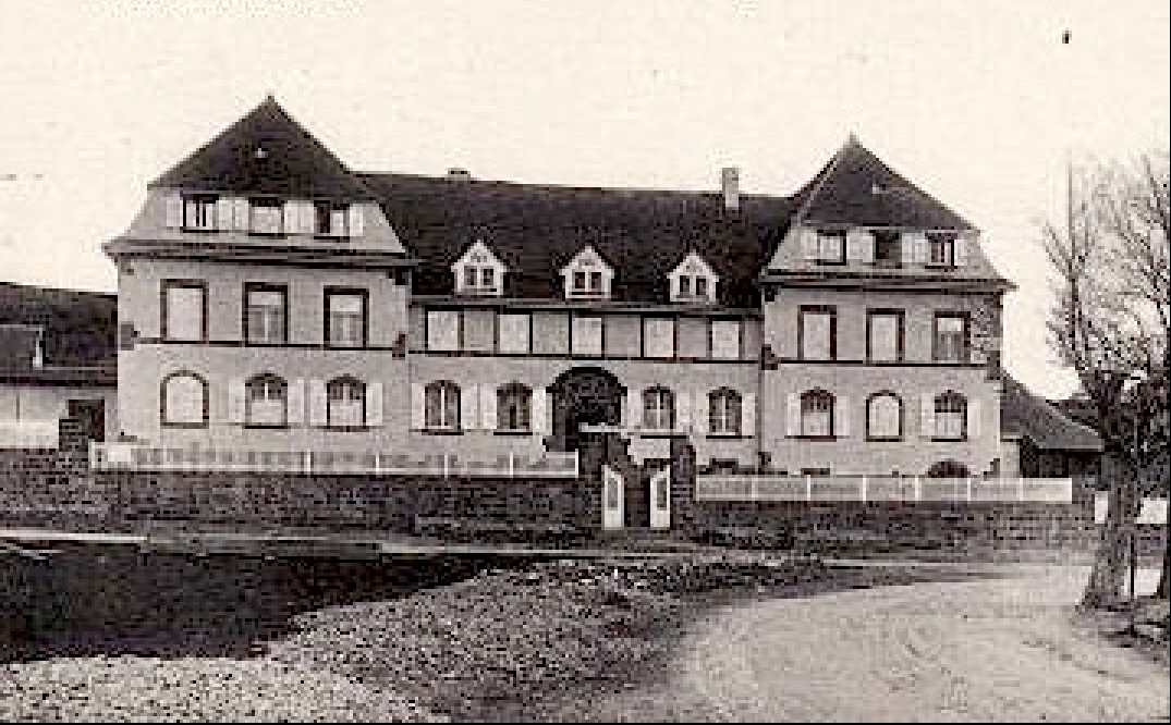 Wasselonne. Le nouvel יôpital cantonal vers 1920